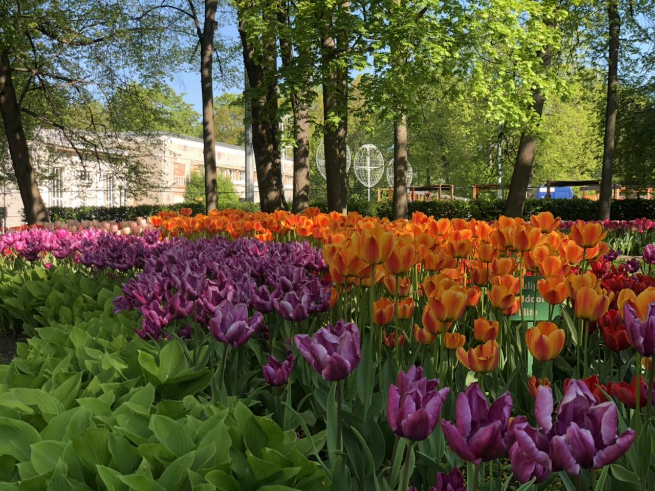 Сад на острове